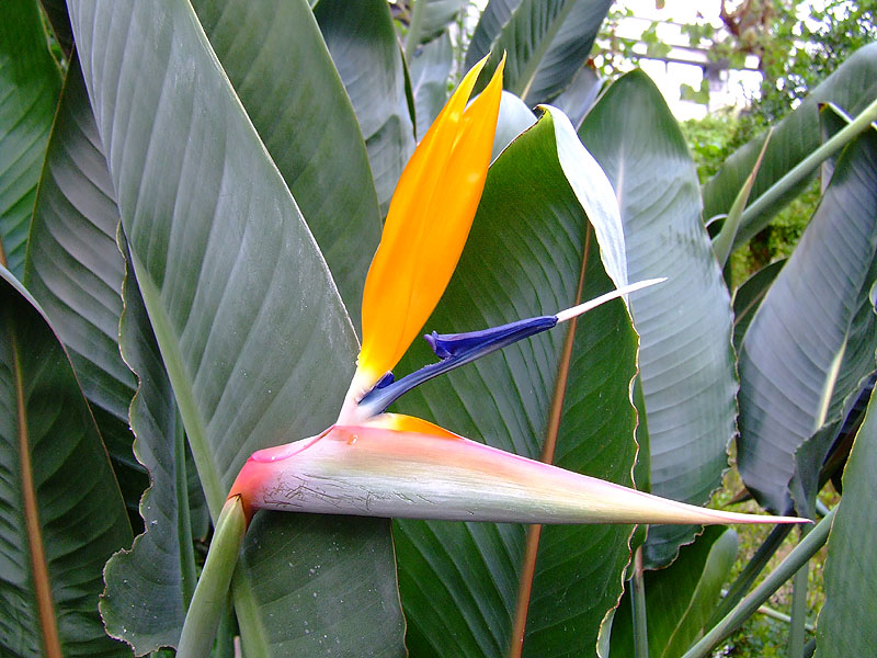 Strelitzia reginae im Botanischen Garten Berlin